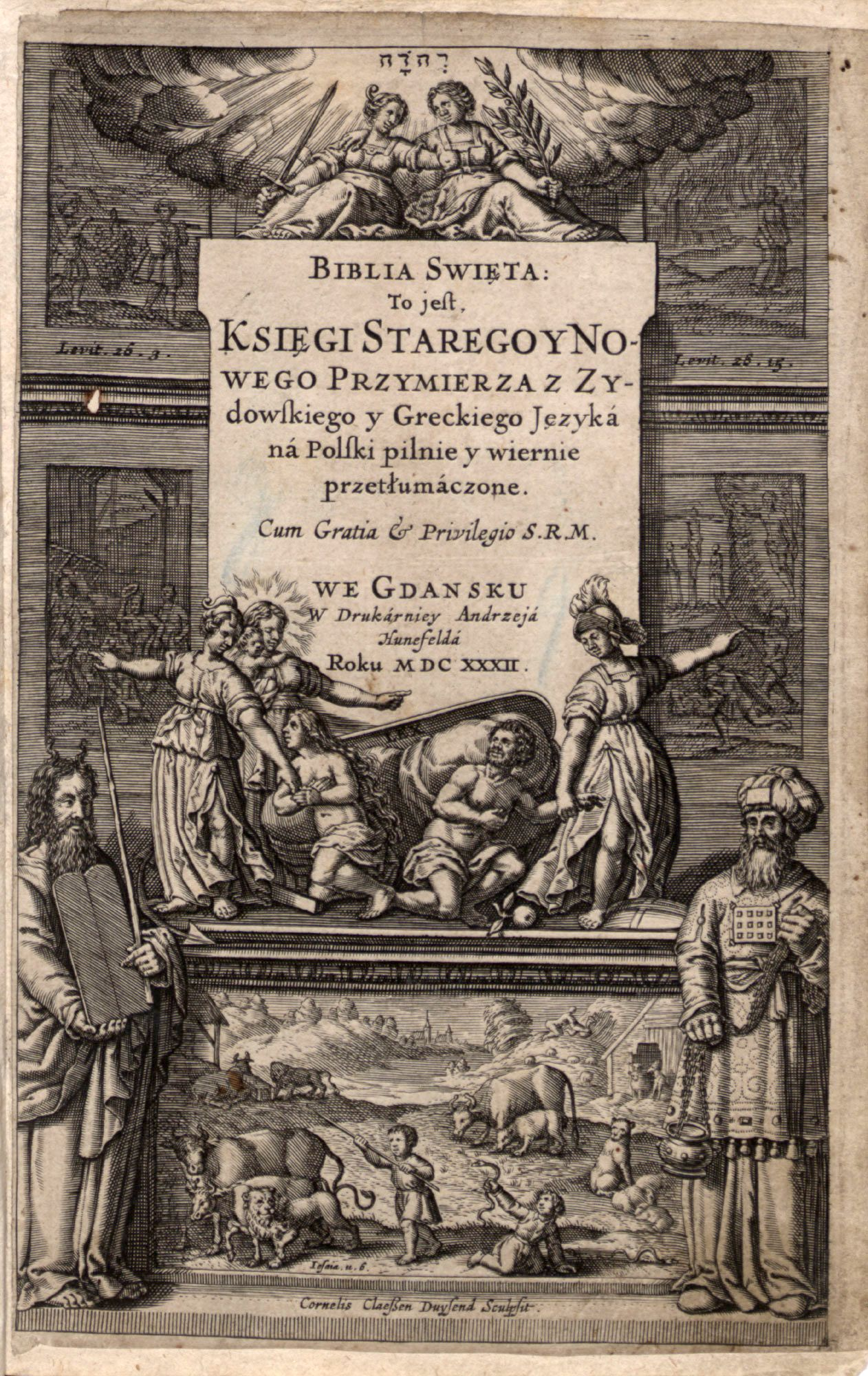 Biblia Gdańska z 1632 r. Strona Tytułowa